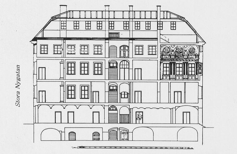 Schönfeldtska huset, sektion, vy mot söder. Överst t.h. syns festsalen